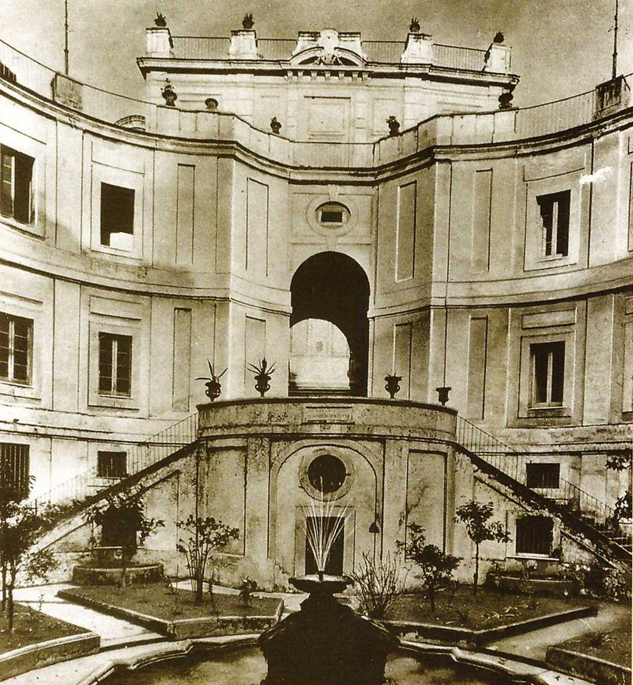 Napoli - Santi Marcellino e Festo, struttura Vanvitelliana nel chiostro. Autore sconosciuto.